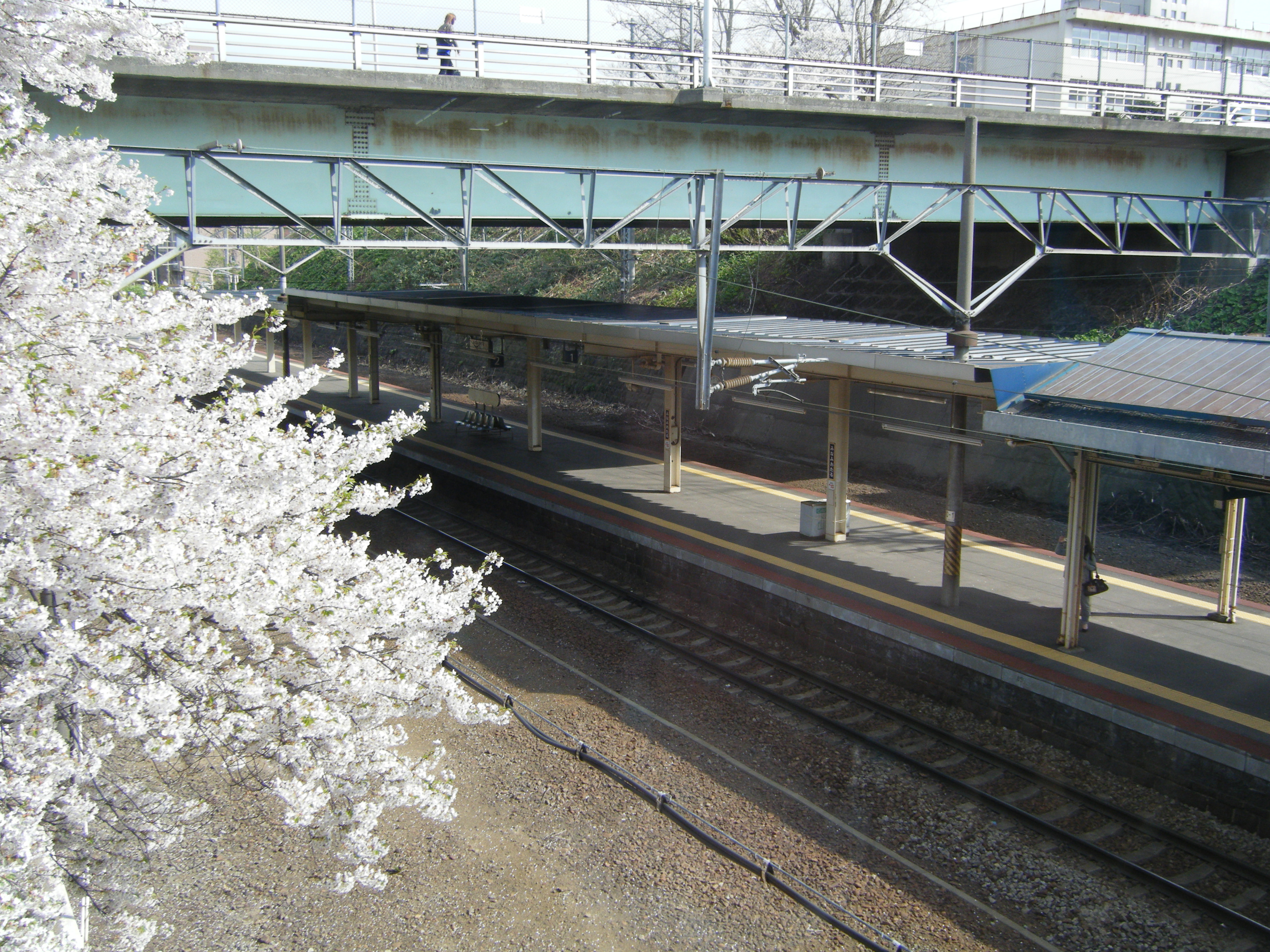 南小樽駅ホーム。駅舎内より撮影。